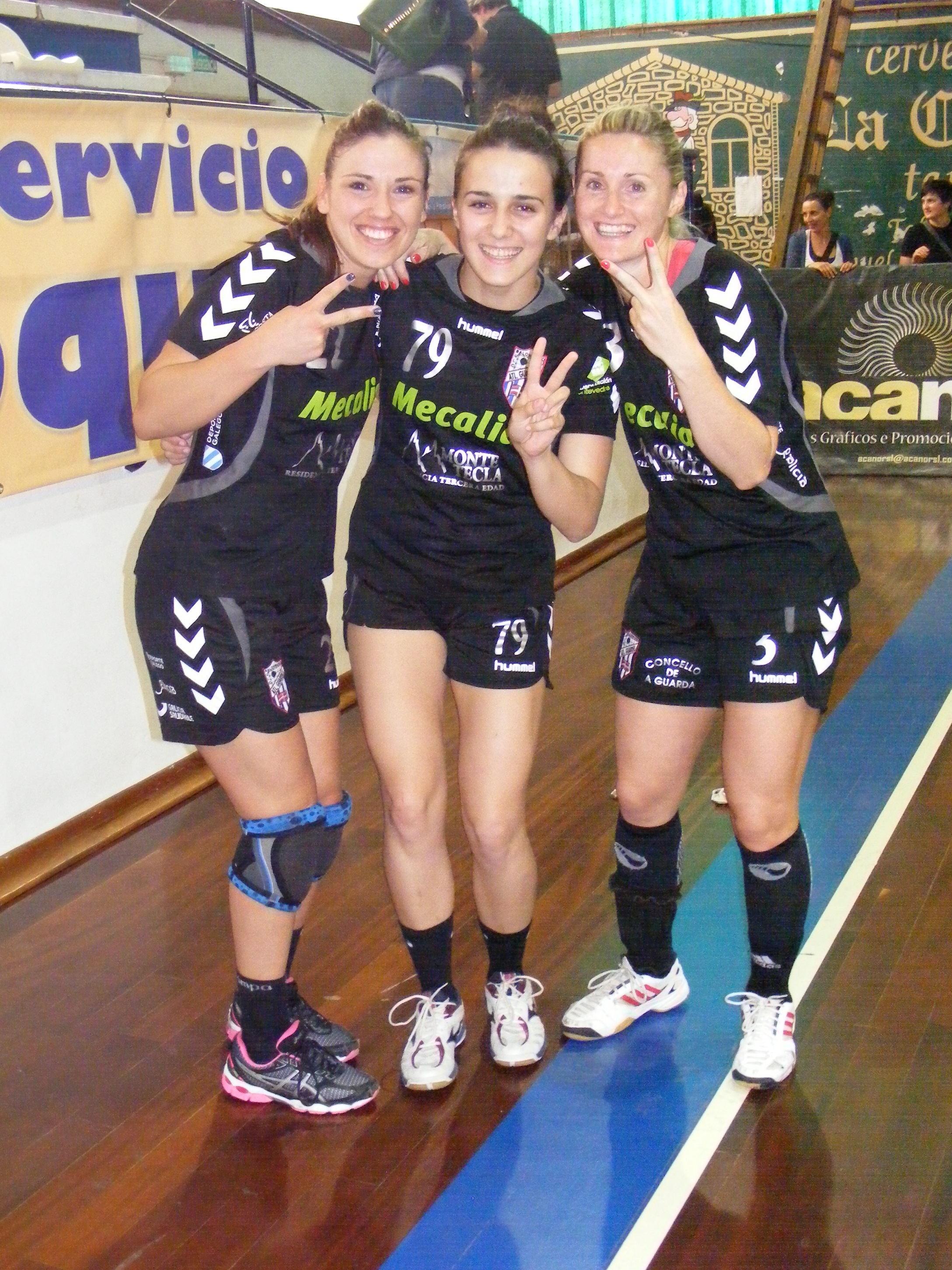 Carmen Martín, Laura Morais y Vanesa Amorós en el partido del Atlético Guardés contra el Castelldefels el 17 de mayo de 2014